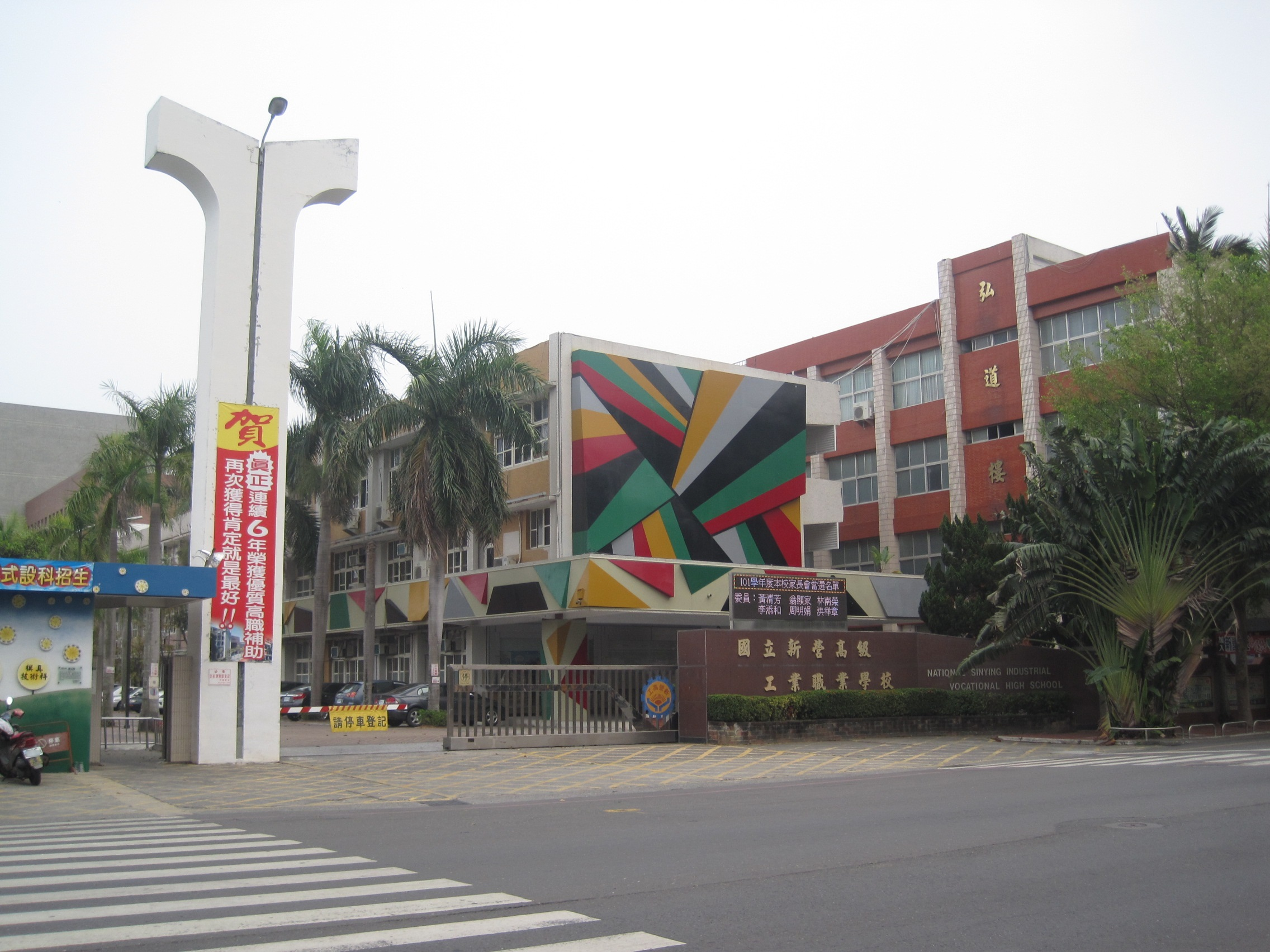 新營高工校門